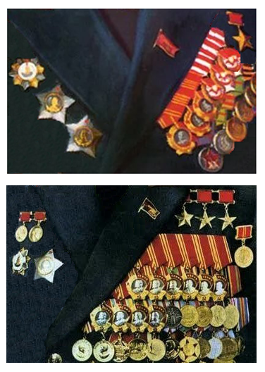 ношение наград